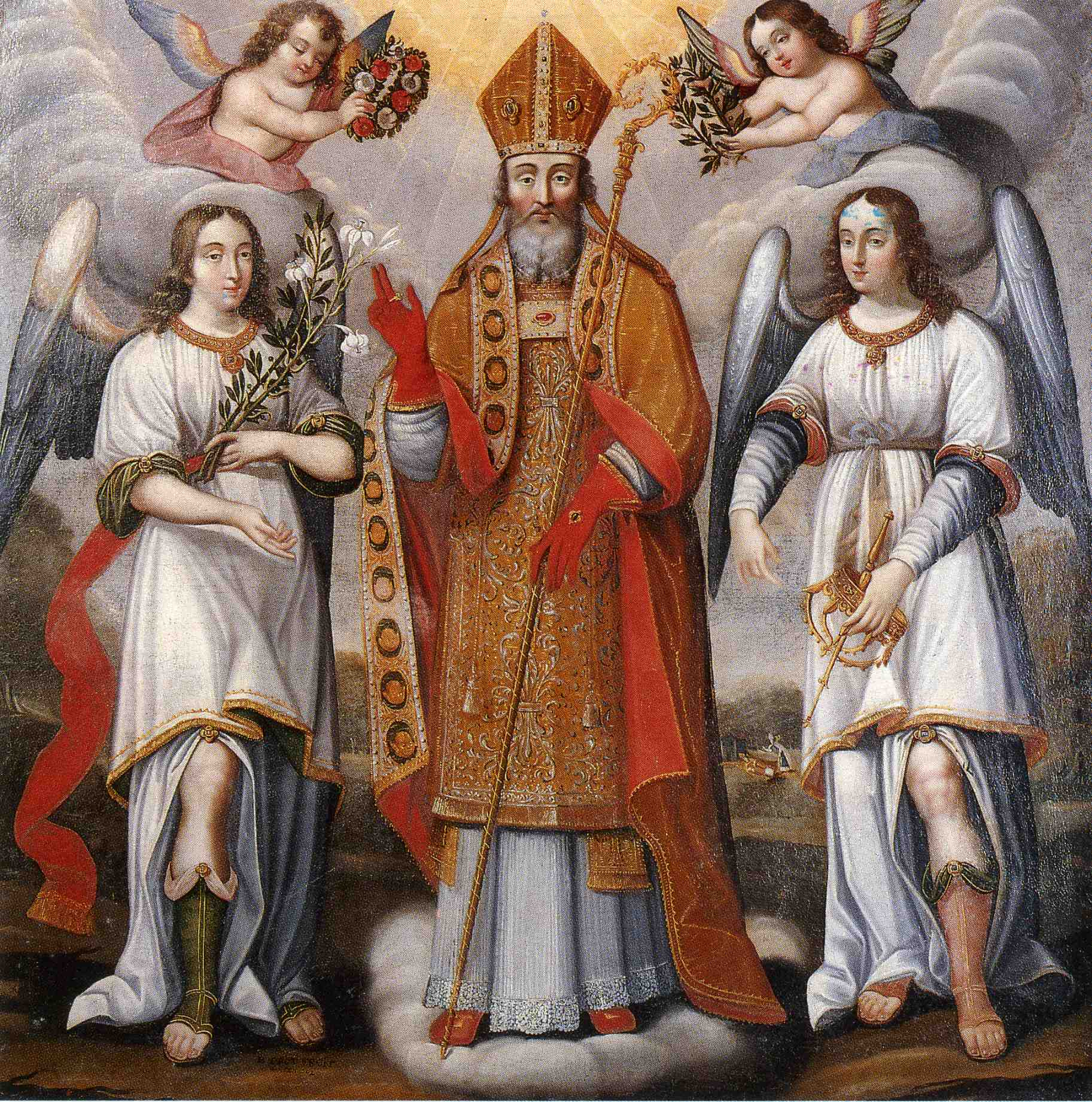 La Glorification de saint Déodat (huile sur toile)